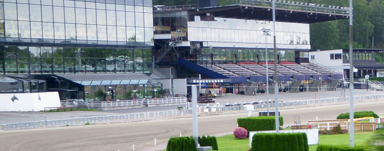 Solvalla travbana i Stockholm